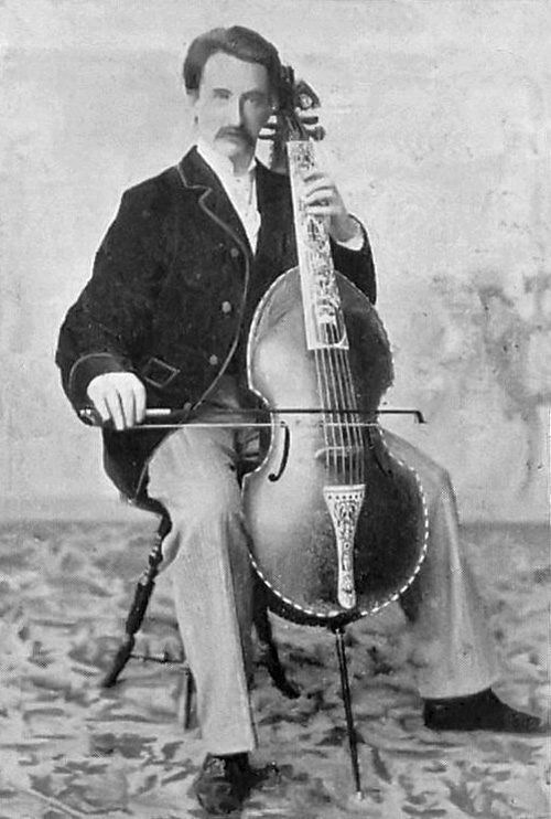 Paul de Wit als Viola da Gamba-Spieler